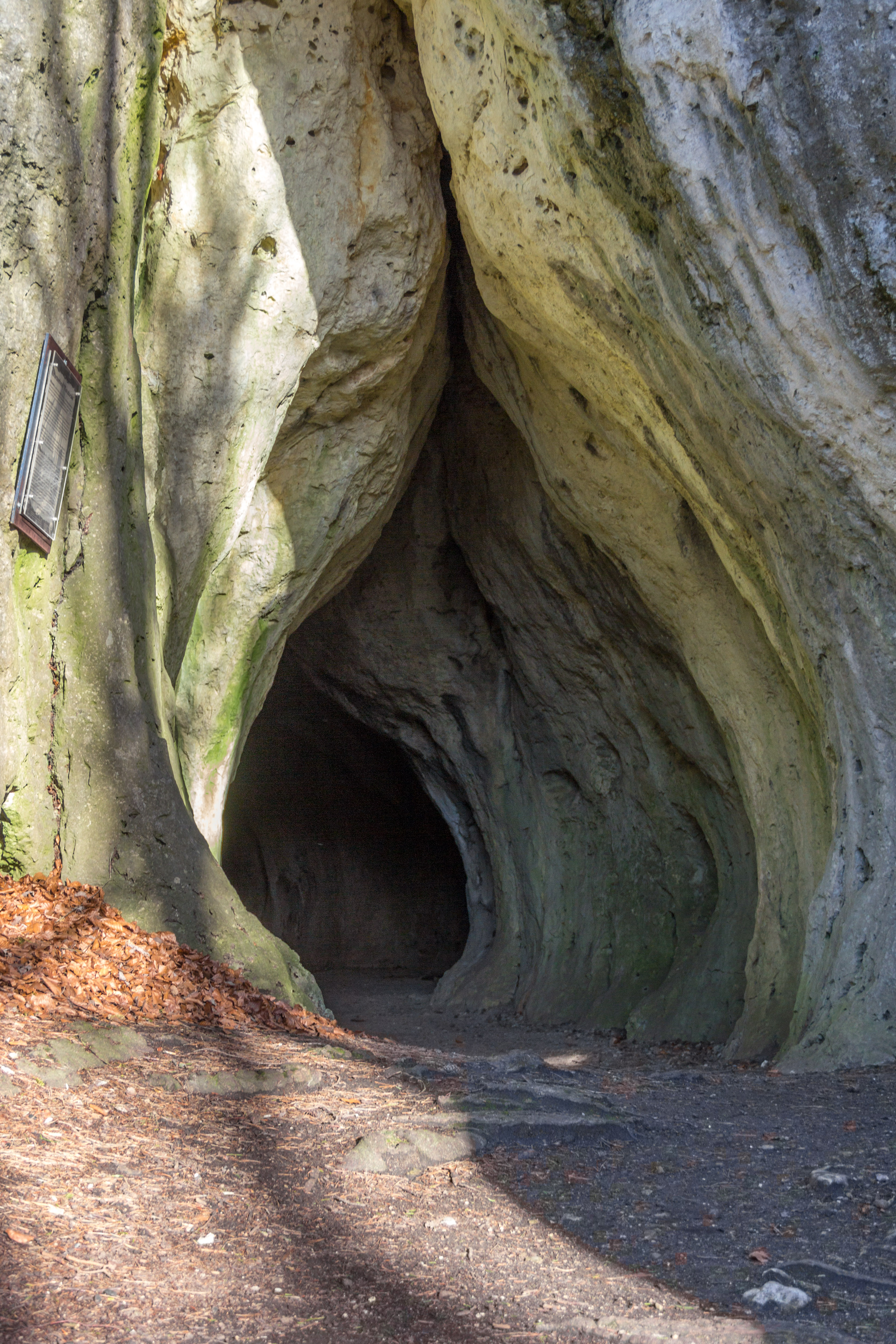 Klauskirche, D 32, Betzenstein, Geotop